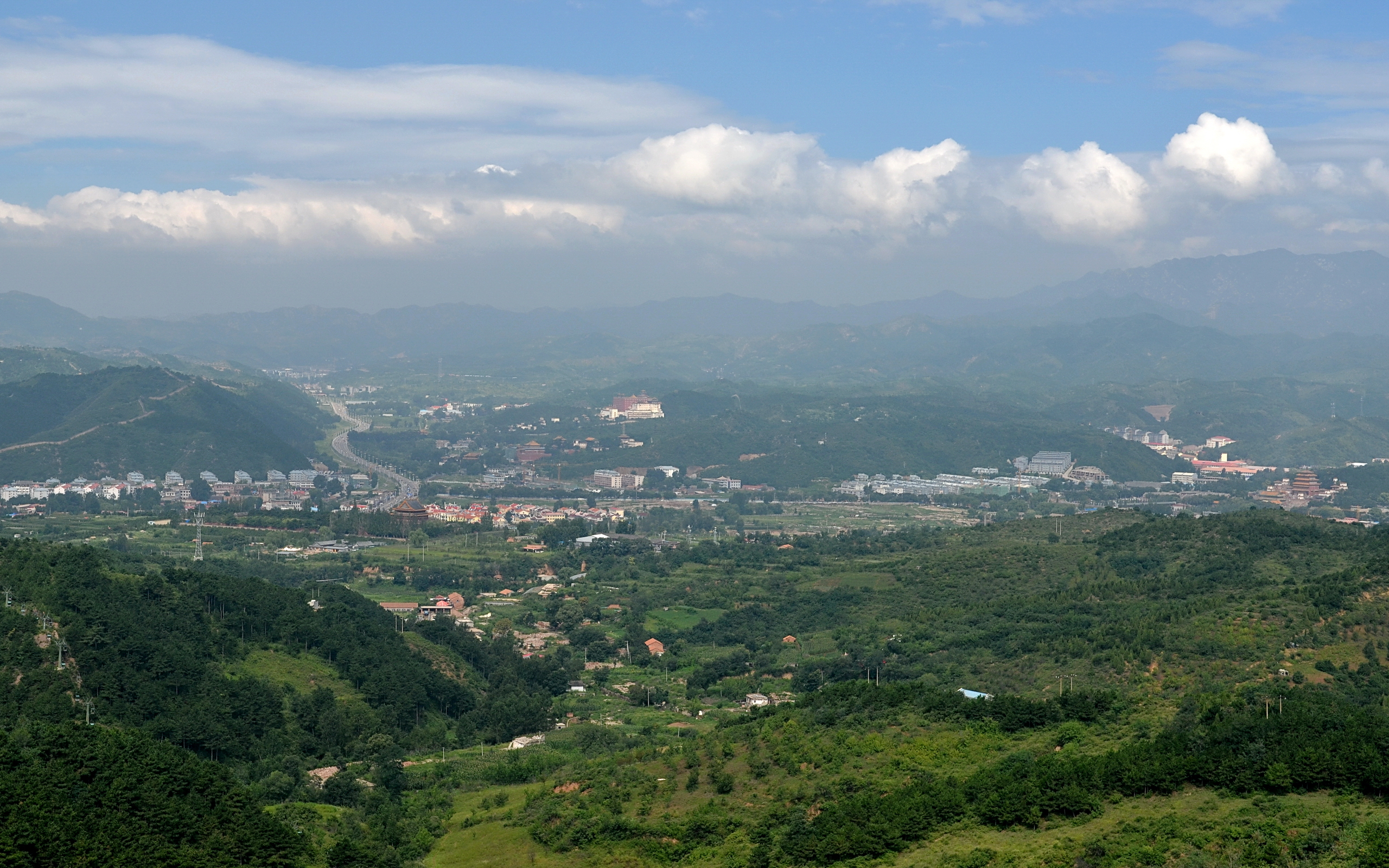 中文（中国大陆）: 位于避暑山庄北侧的武烈河谷分布着一系列皇家寺庙